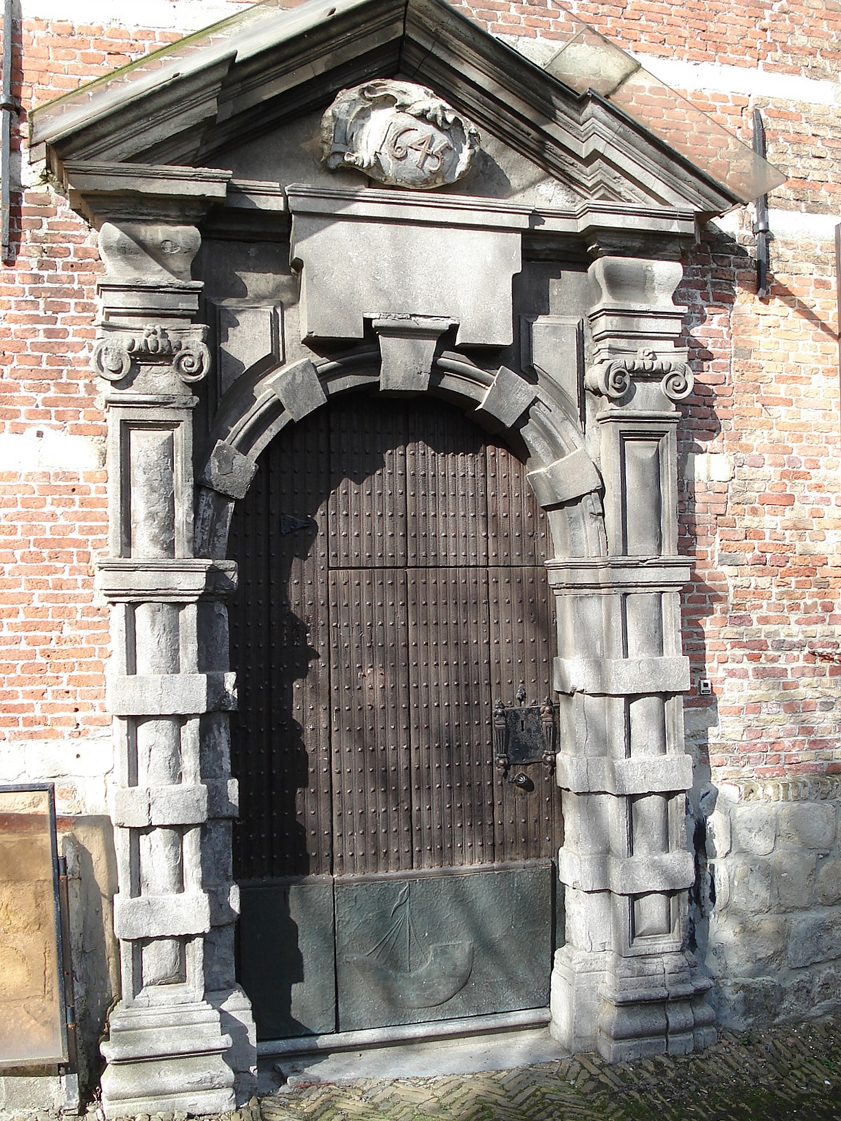 Doel (gem. Beveren). Hooghuis, barokke poort (begin 17de eeuw).